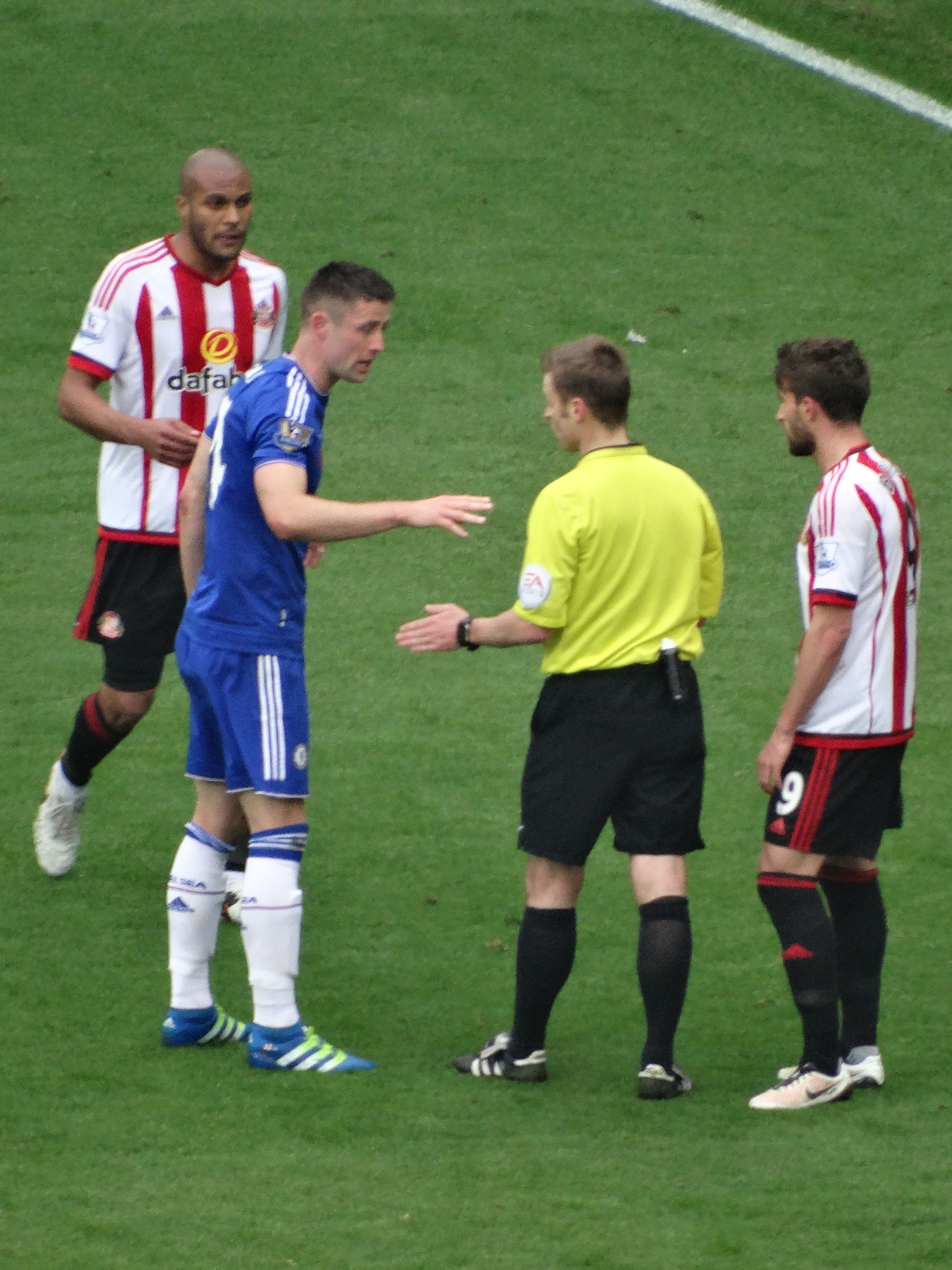 Sunderland 3 Chelsea2